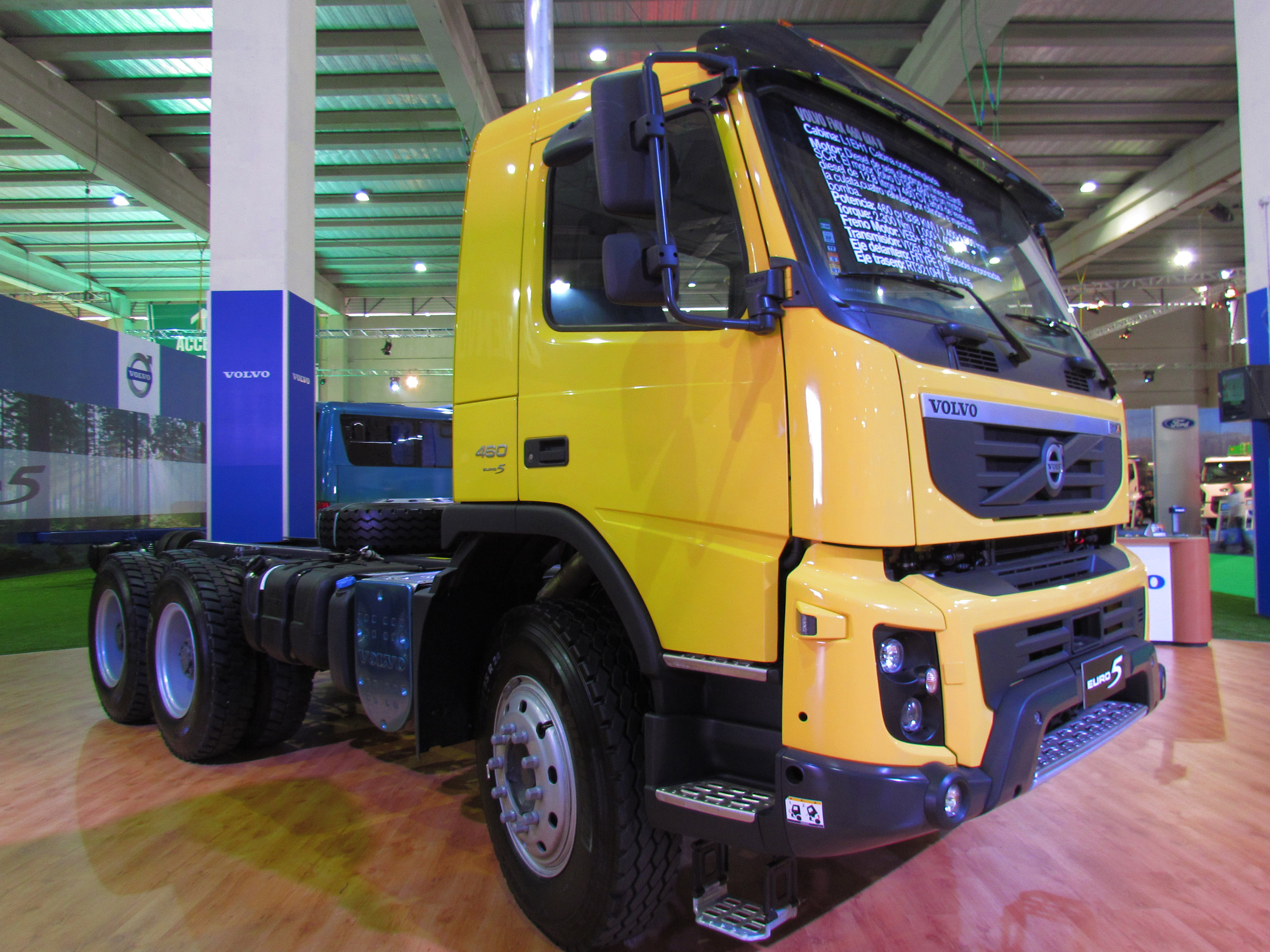 Volvo FMX 460 6x4 2012